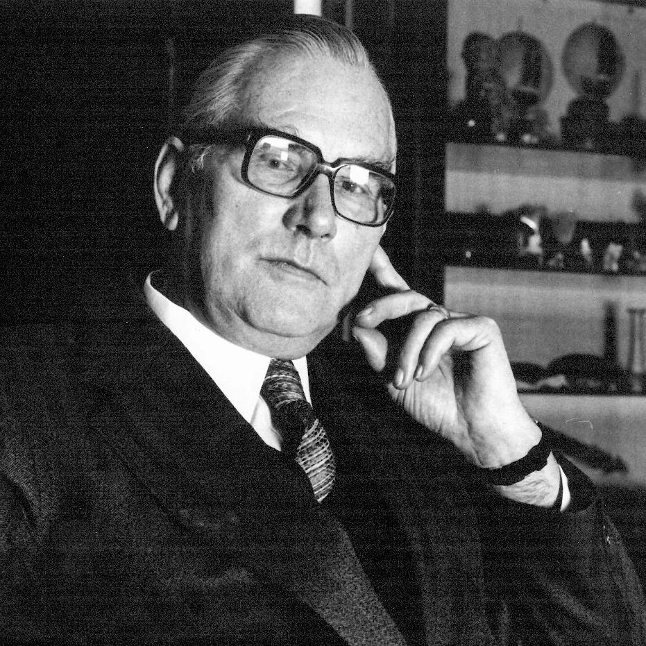 Foto von Herbert Wilhelmy